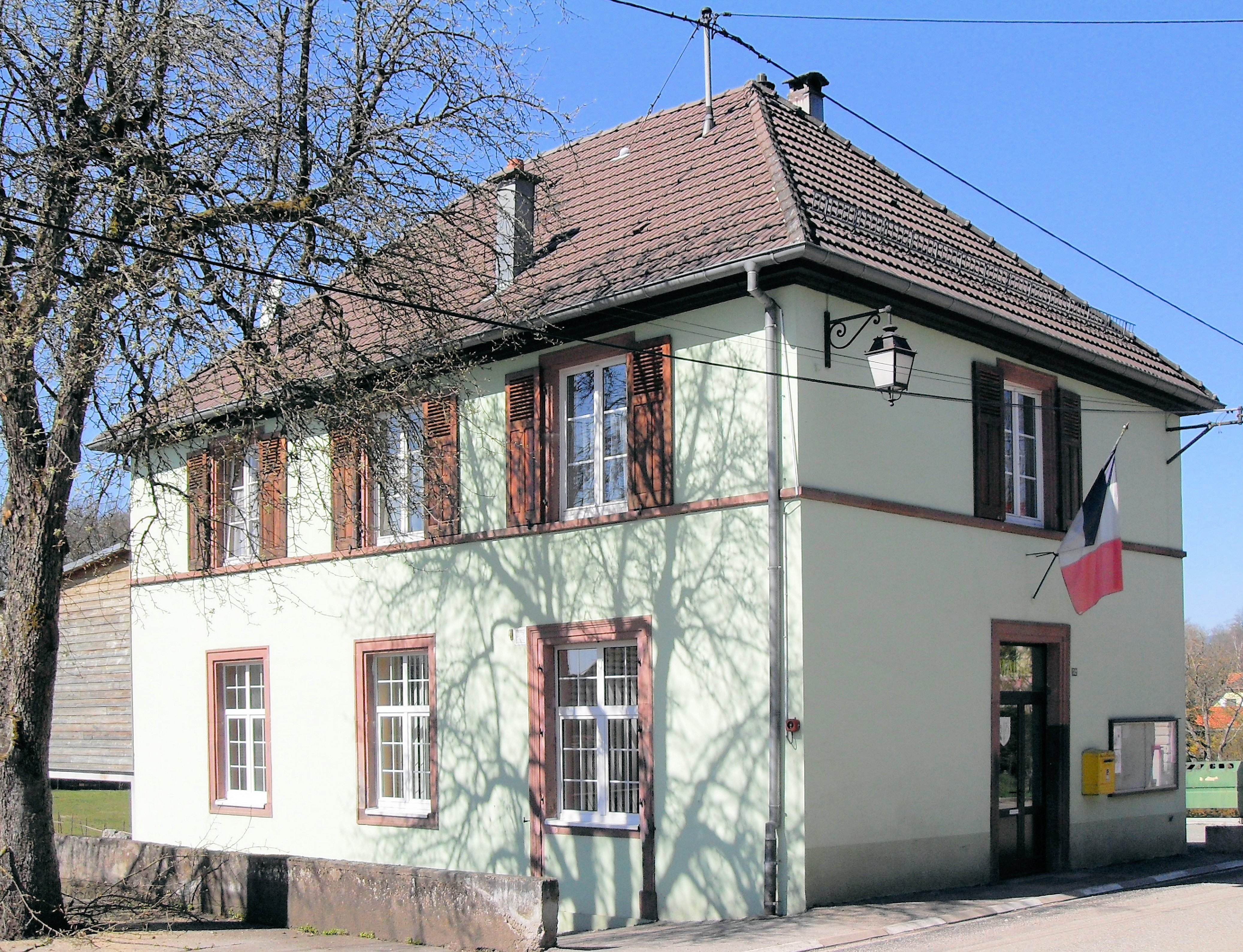 La mairie de Bretten